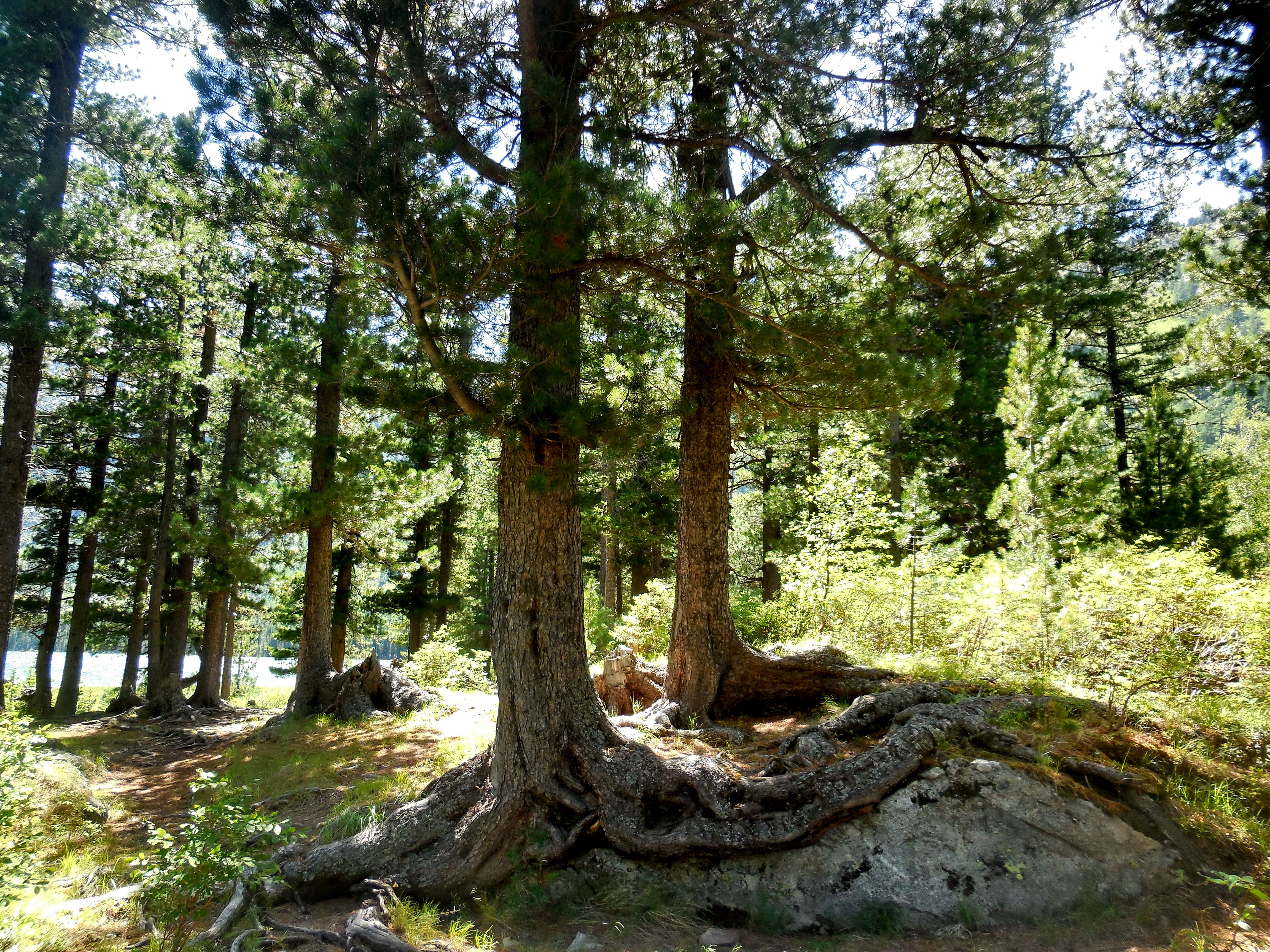 Горный Алтай